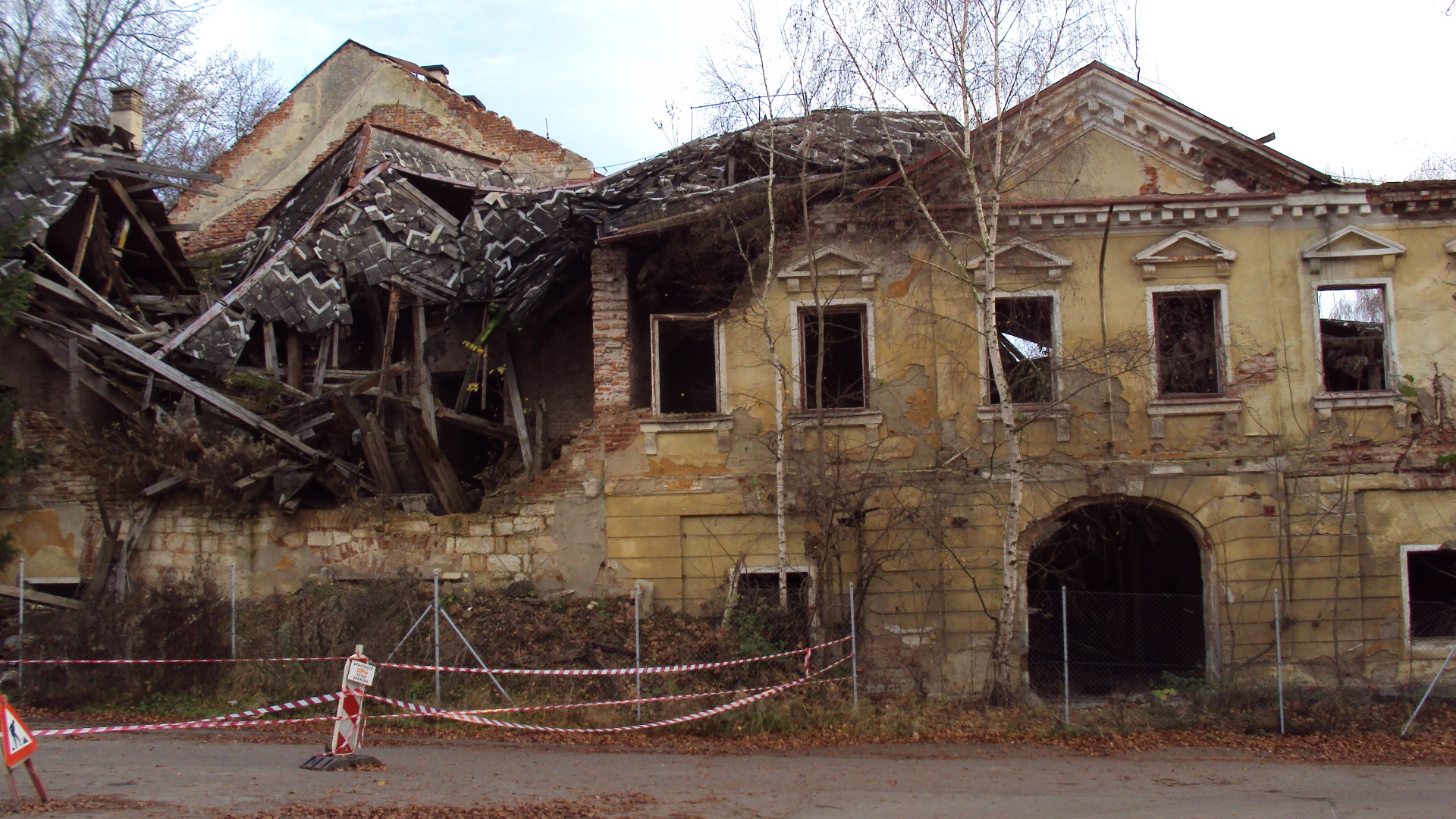 Ruina zámečku v Nových Zákupech zpředu a zblízka